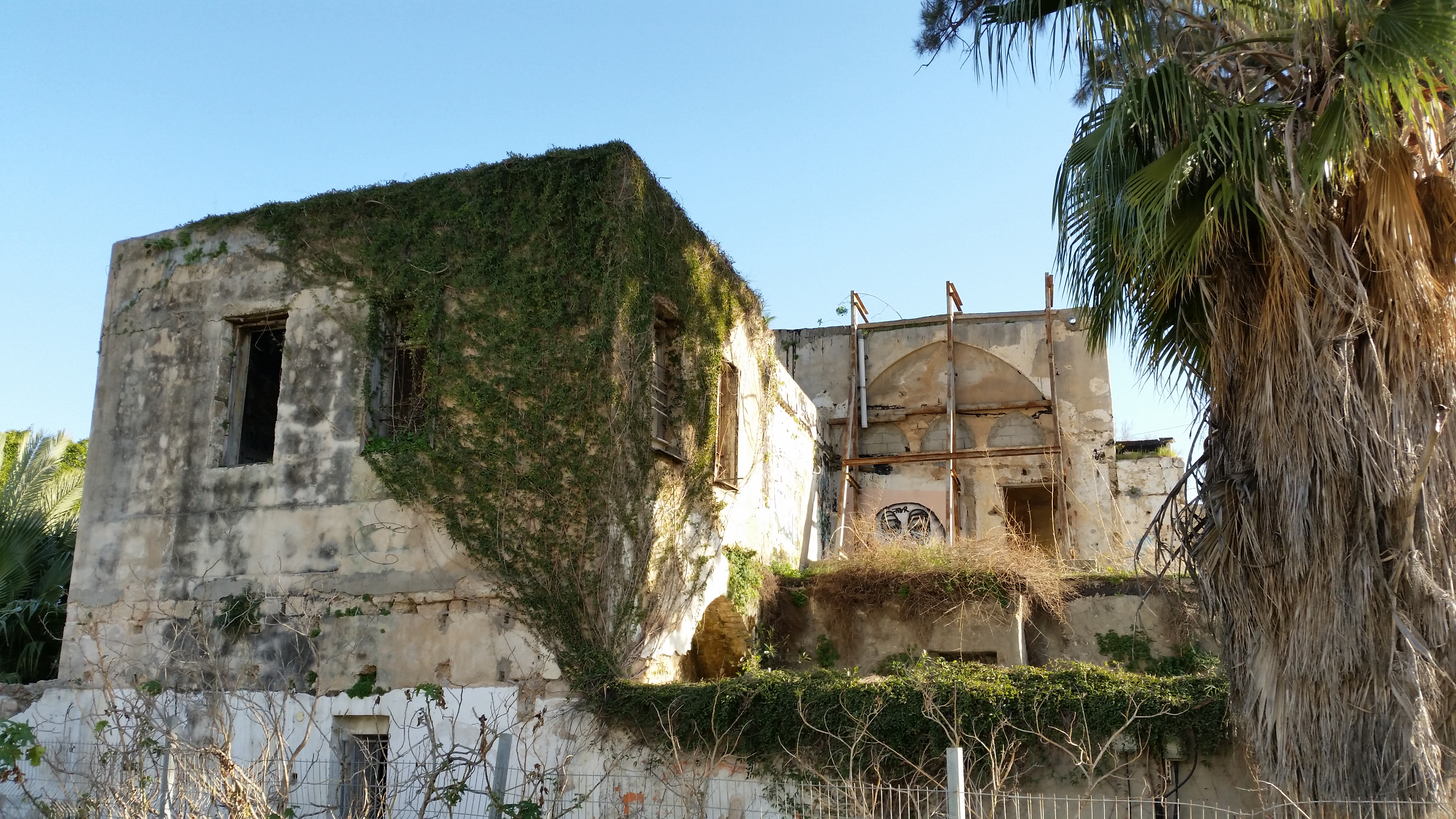 בית הביל"ויים מוקף גינה ציבורית בקצה שכונת נוה עופר